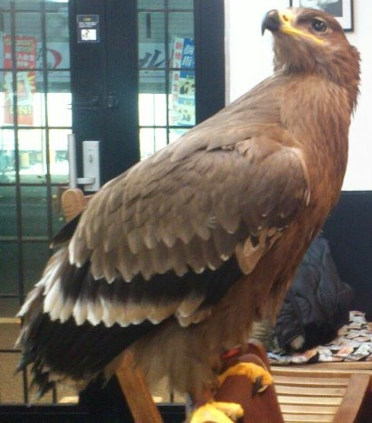 ソウゲンワシ（幼鳥）